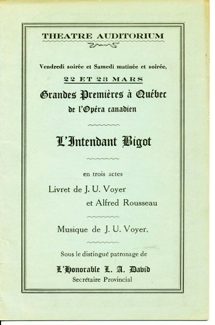 Programme de la présentation de l'opéra L'Intendant Bigot à l'Auditorium de Québec les 22 et 23 mars 1929